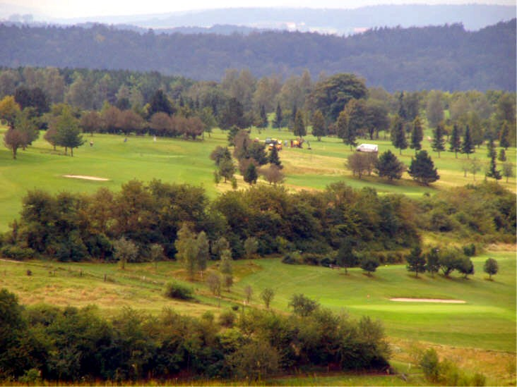 Das Foto zeigt den Golfplatz bei Hofbieber, der zur Gemeinde Hofbieber gehört. Copyright Status: GNU Freie Dokumentationslizenz